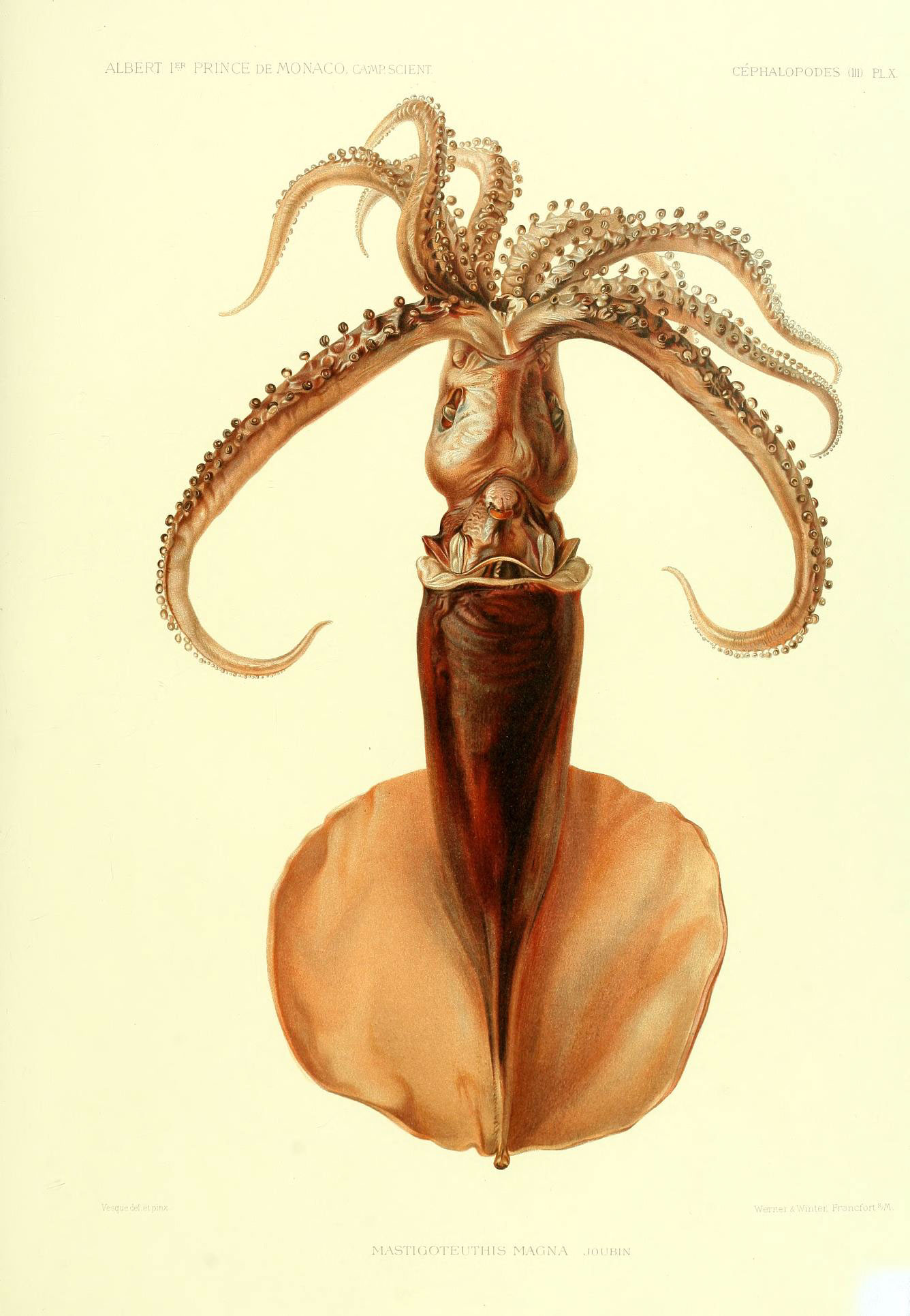 Résultats des campagnes scientifiques accomplies sur son yacht par Albert Ier, prince souverain de Monaco ...